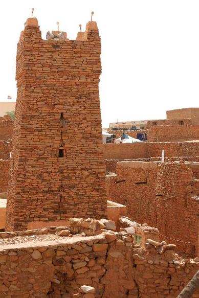 Le minaret carré de la mosquée dans le quartier vieux, MauritanieOld town, Chinguetti, Mauritania